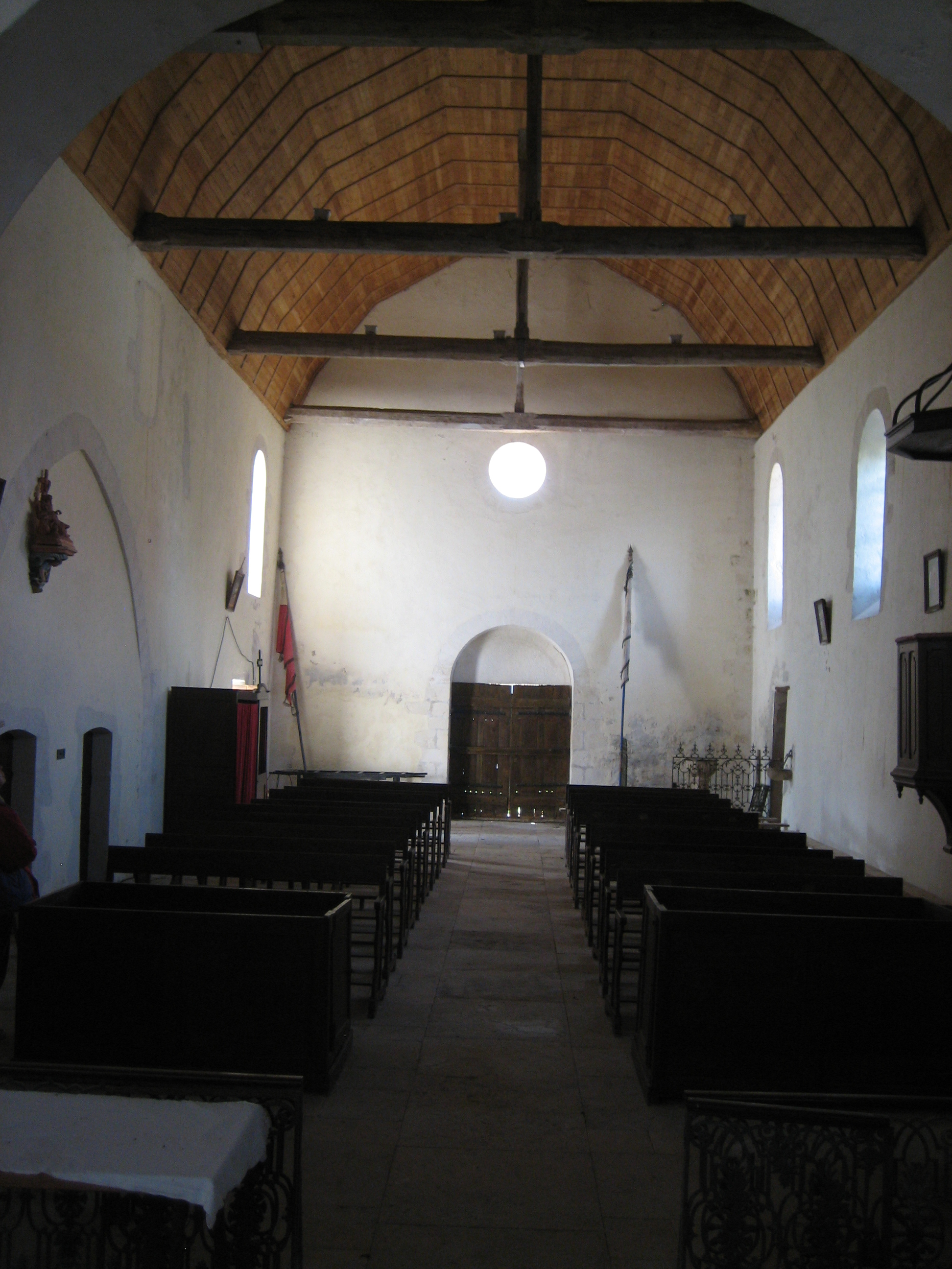 Église Saint-Martin de Montlouis (Cher). XIIe et XIIIe siècle, restauration au XIXe siècle